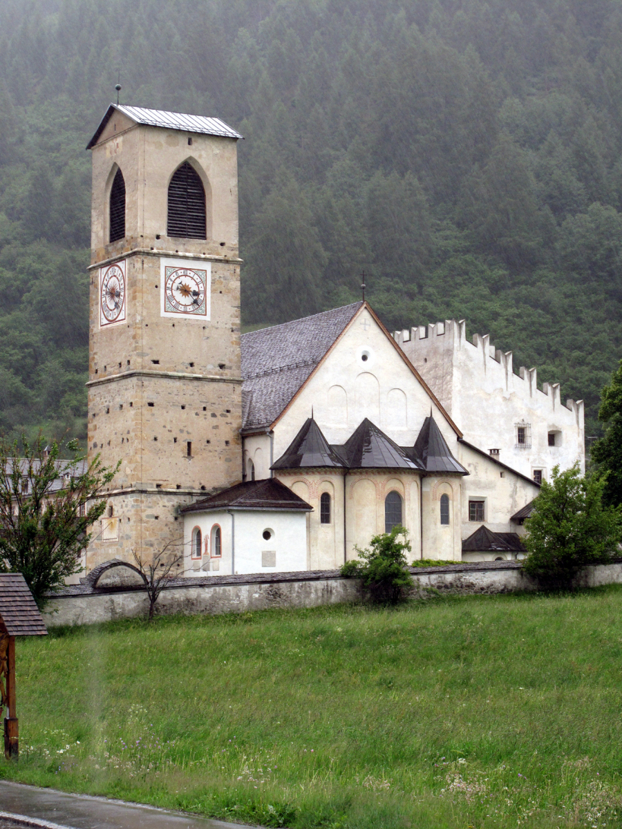 Müstair, église bénédictine, chevet